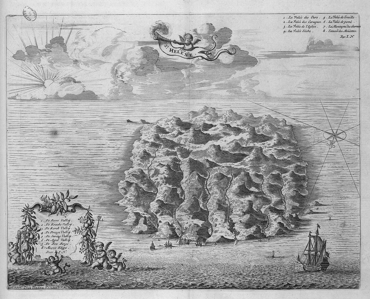 Sainte-Hélène